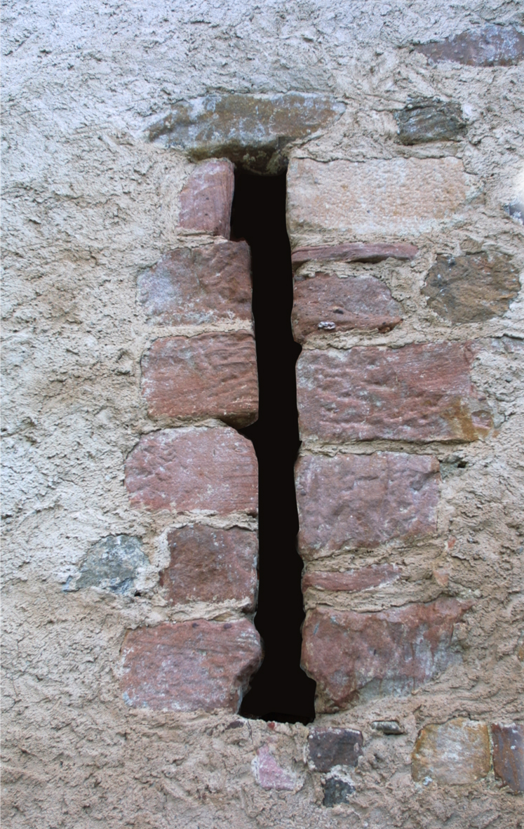 Meurtrière à embrasure ou à niche large du château de Hartmannswiller.